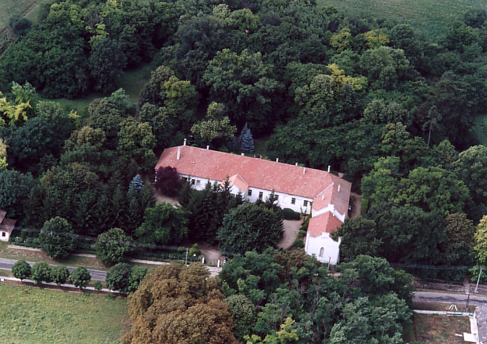 Zala, Hungary, aerialphotography